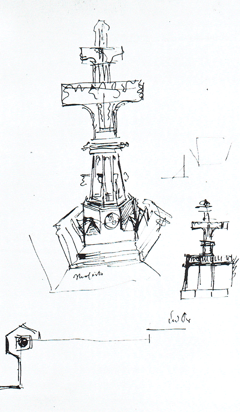 Entwurf einer Kreuzblumen-Plastik vor dem Kölner Dom von 1879, nicht umgesetzt